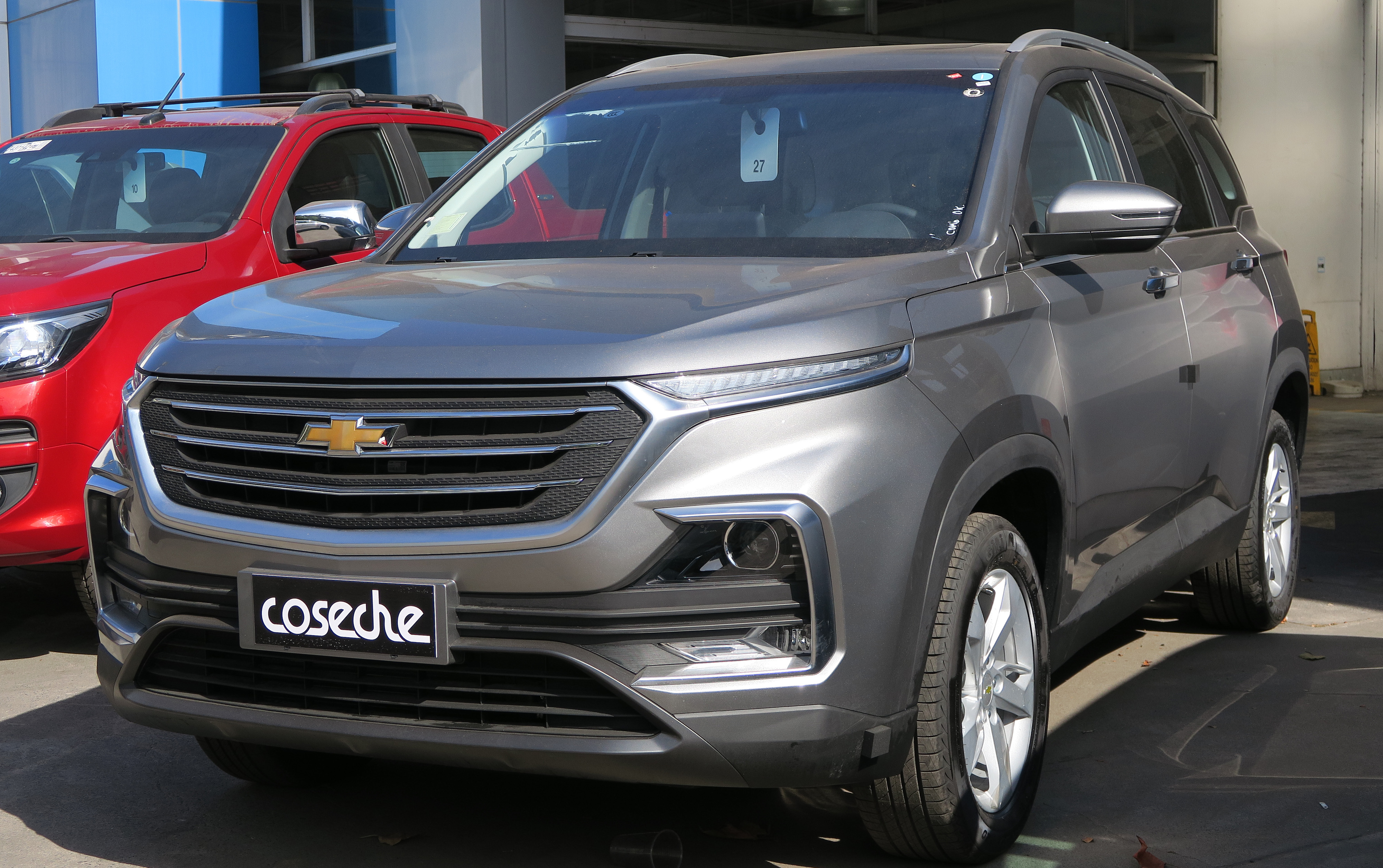 Chevrolet Captiva 1.5T LT 2019